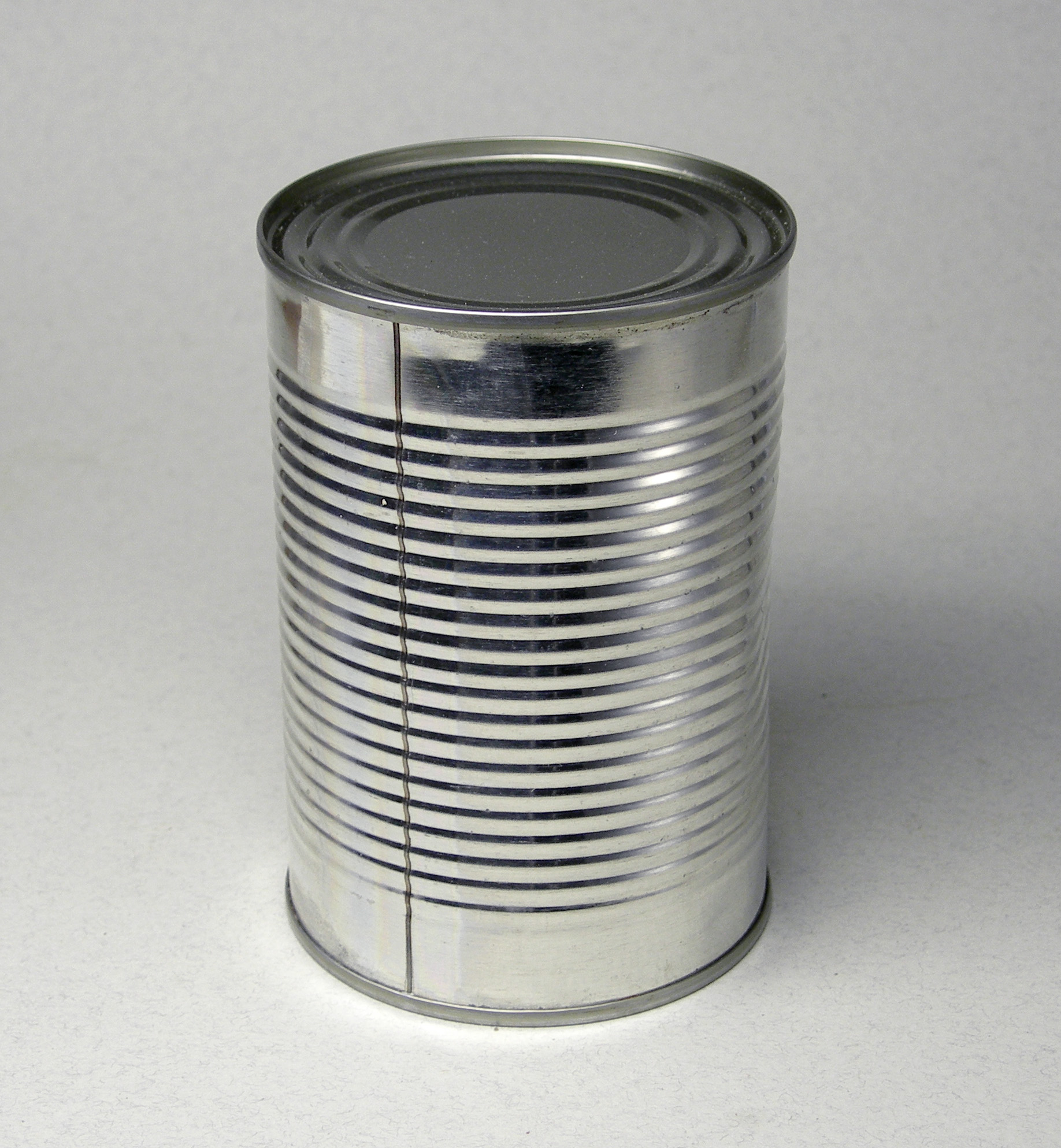 Konservendose. Eigene Aufnahme